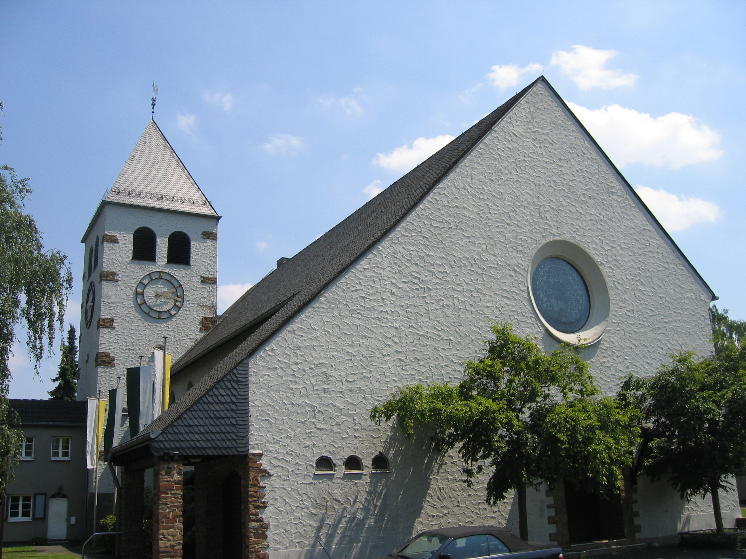 Kirche St.Konrad in Köln-Vogelsang This is a photograph of an architectural monument.